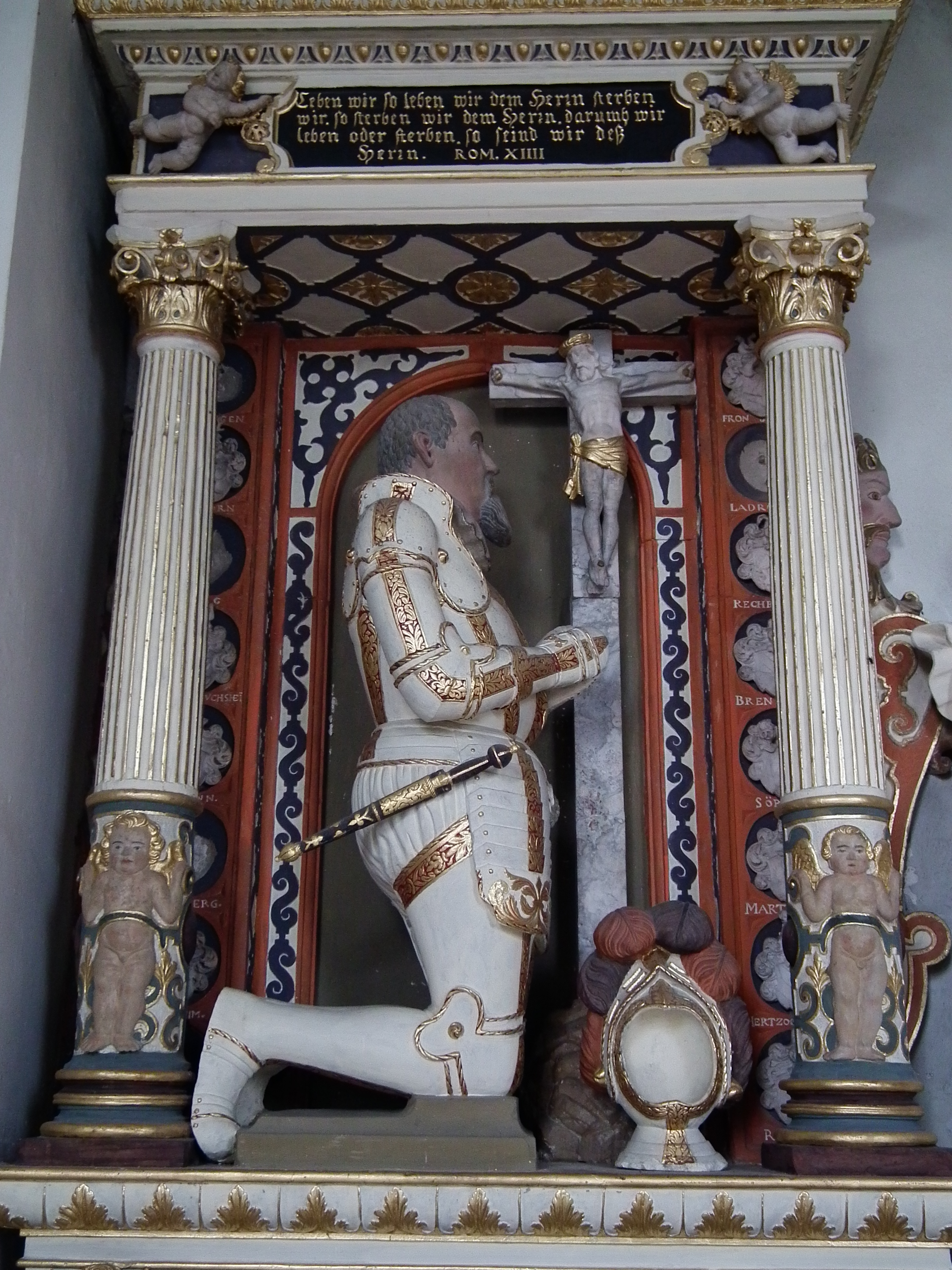 Mittelteil des Epitaph von Ottheinrich von Venningen in der evangelischen Kirche in Neidenstein (Baden-Württemberg, Deutschland)